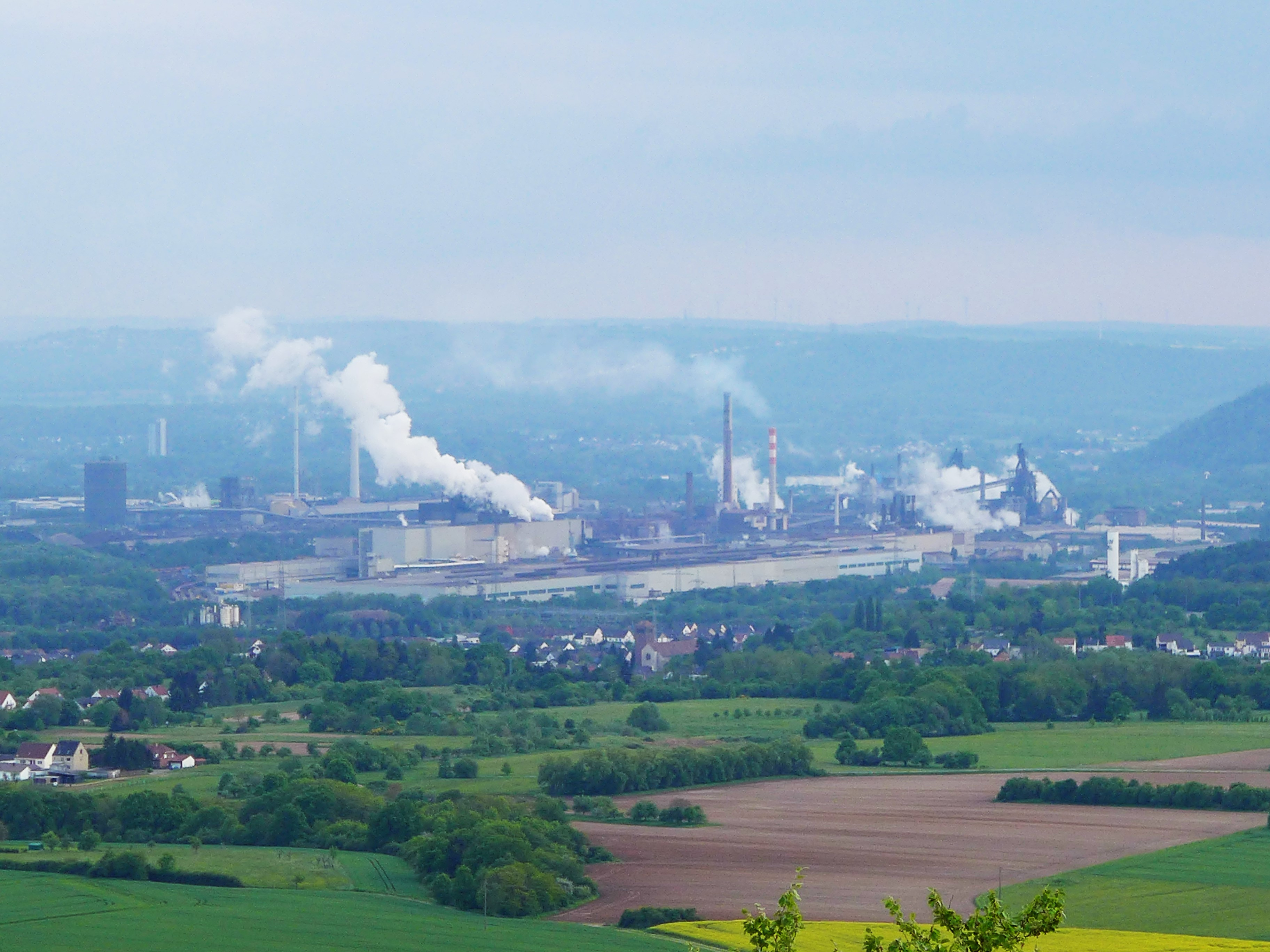 Dillinger Hütte vom Litermont aus gesehen